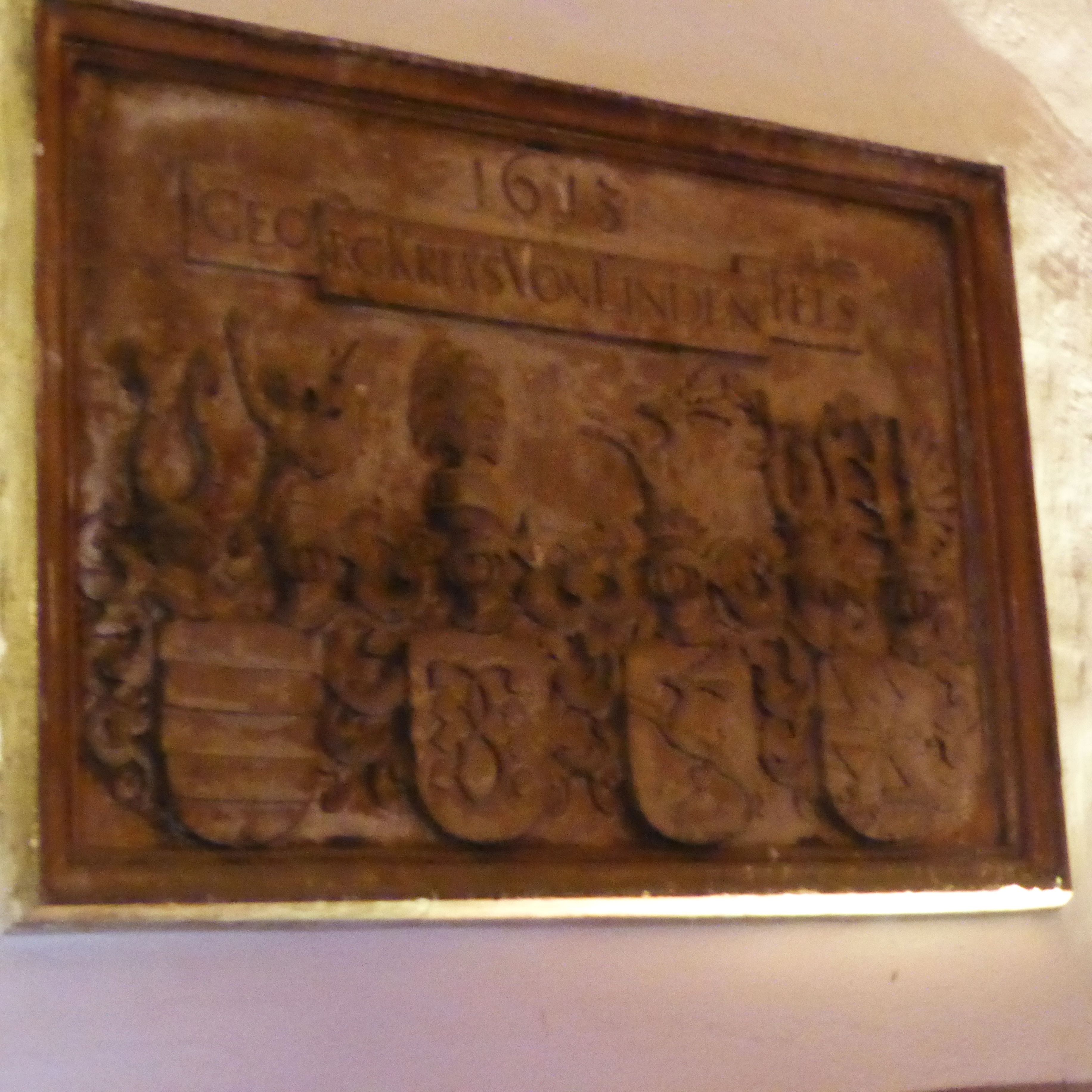 Gedenktafel an Georg Kreis von Lindenfels